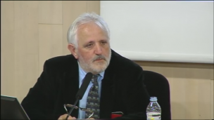 Foto Javier Blasco